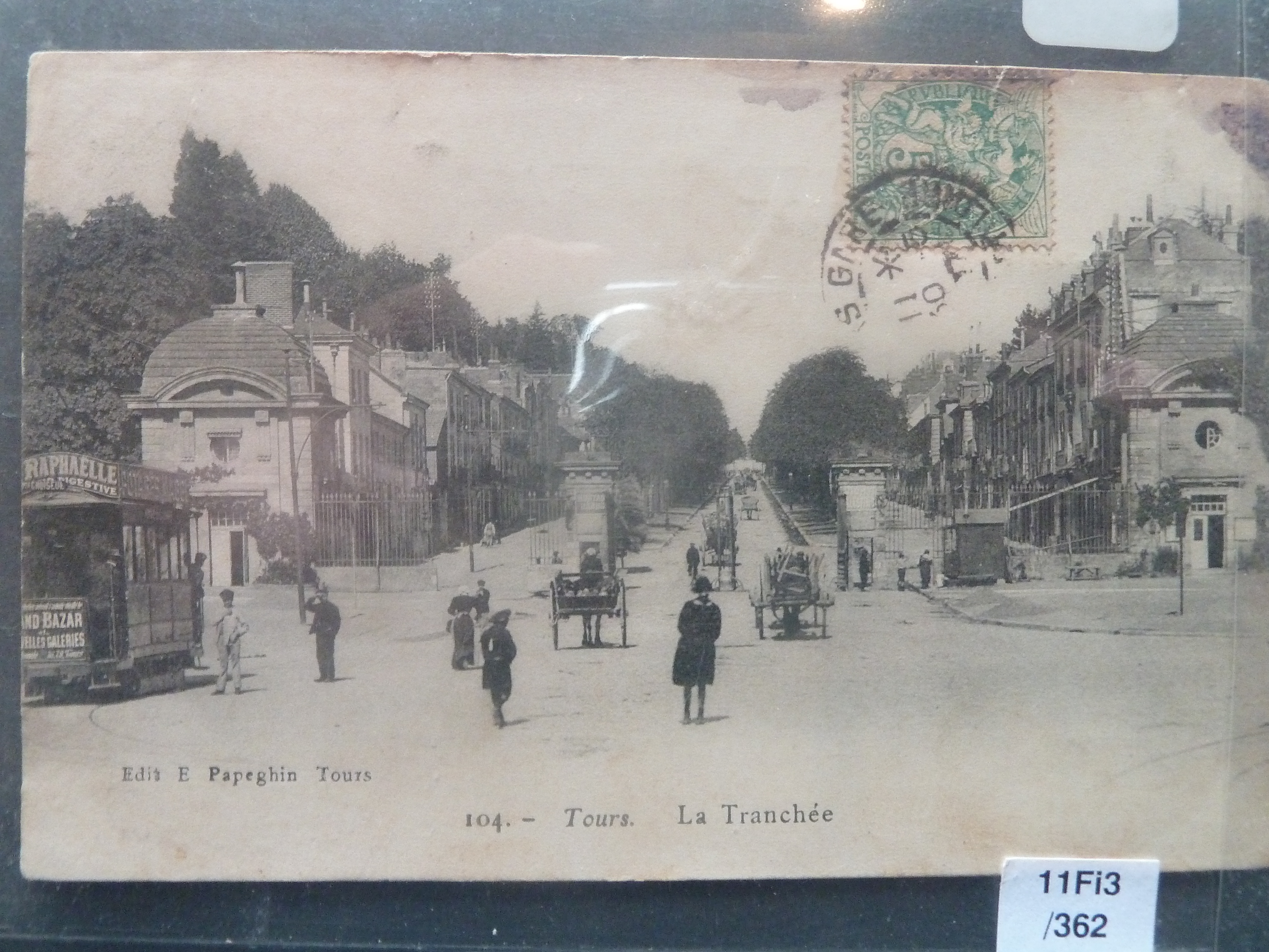 carte postale de la place Choiseul (19eme siècle)